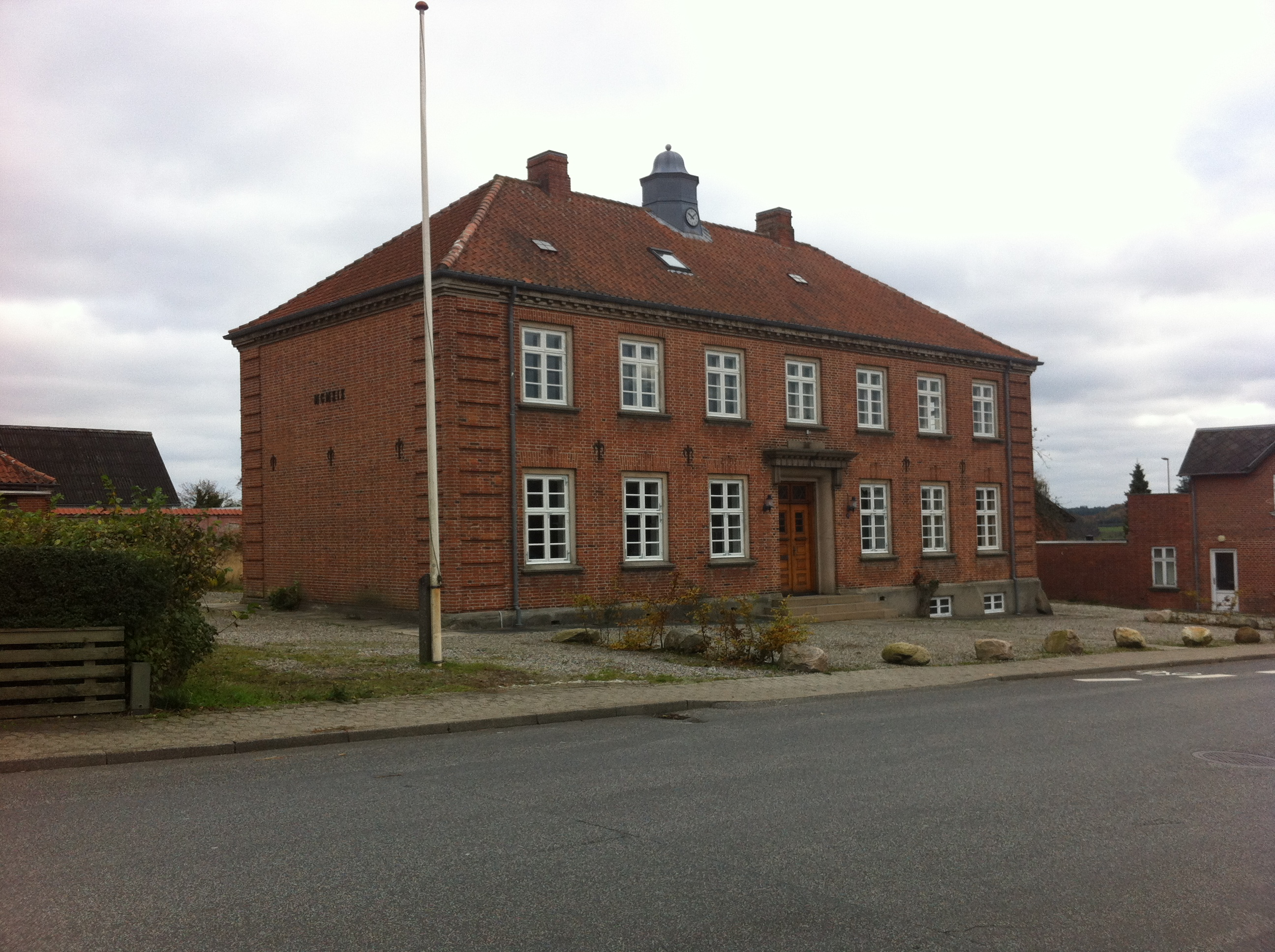 Hadsund Politigård i Tinggade. Billedet er tagede fra vest.